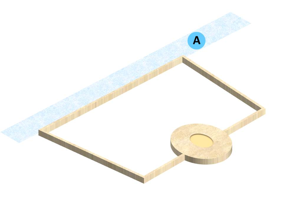 amphithéâtre de Tours phase 4